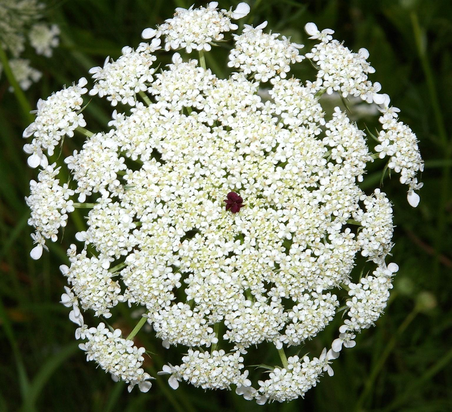 Wilde Möhre (Daucus carota); blühende Dolde. In der Mitte erkennt man eine dunkel-purpurfarbene, sterile Blüte (sogenannte "Mohrenblüte" oder "Scheininsekt"). Damit ahmt die Pflanze ein Insekt nach, um "richtige" Insekten zum Blütenbesuch zu animieren.